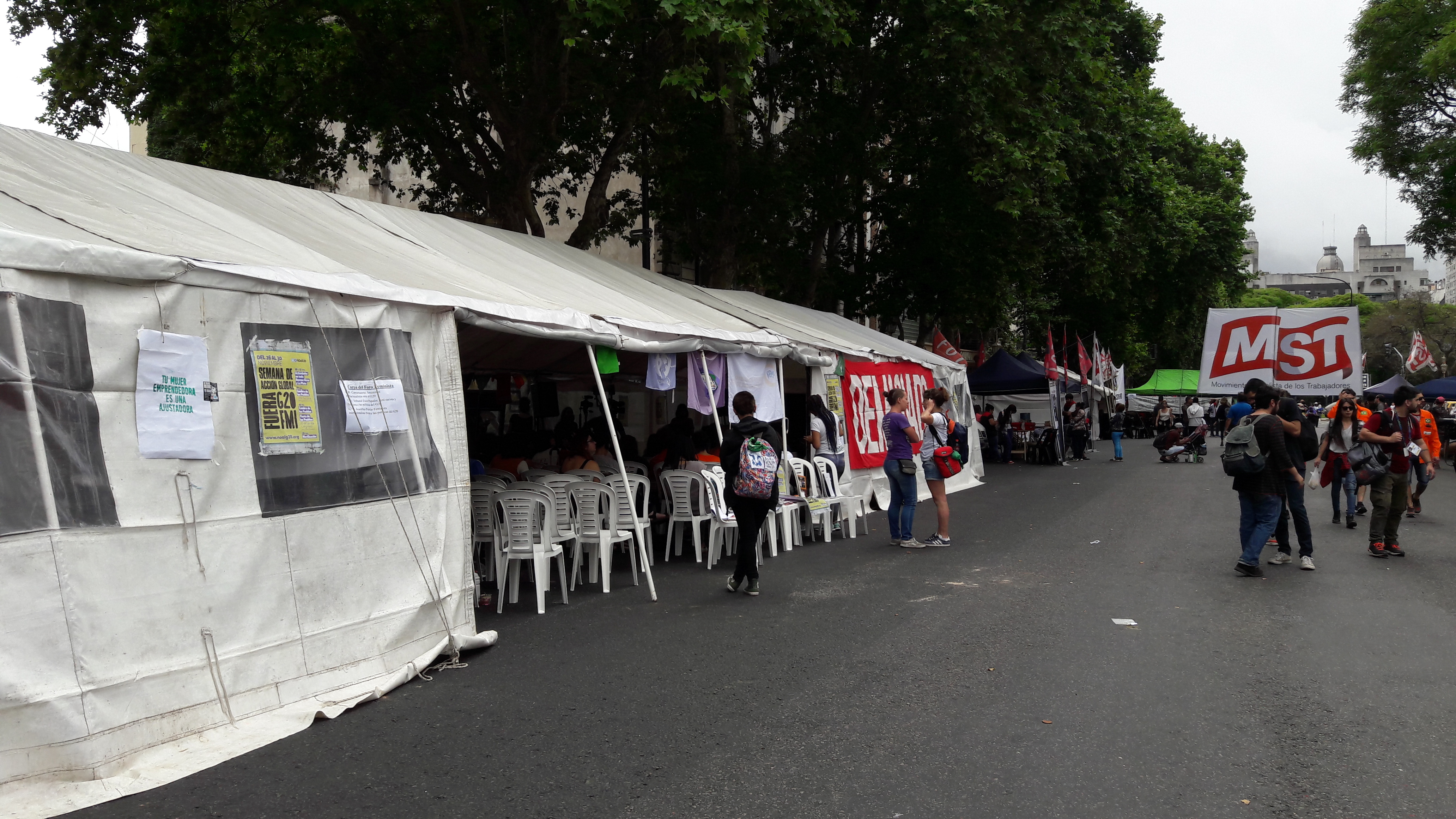 Manifestación contra el G20 y el FMI en Buenos Aires.